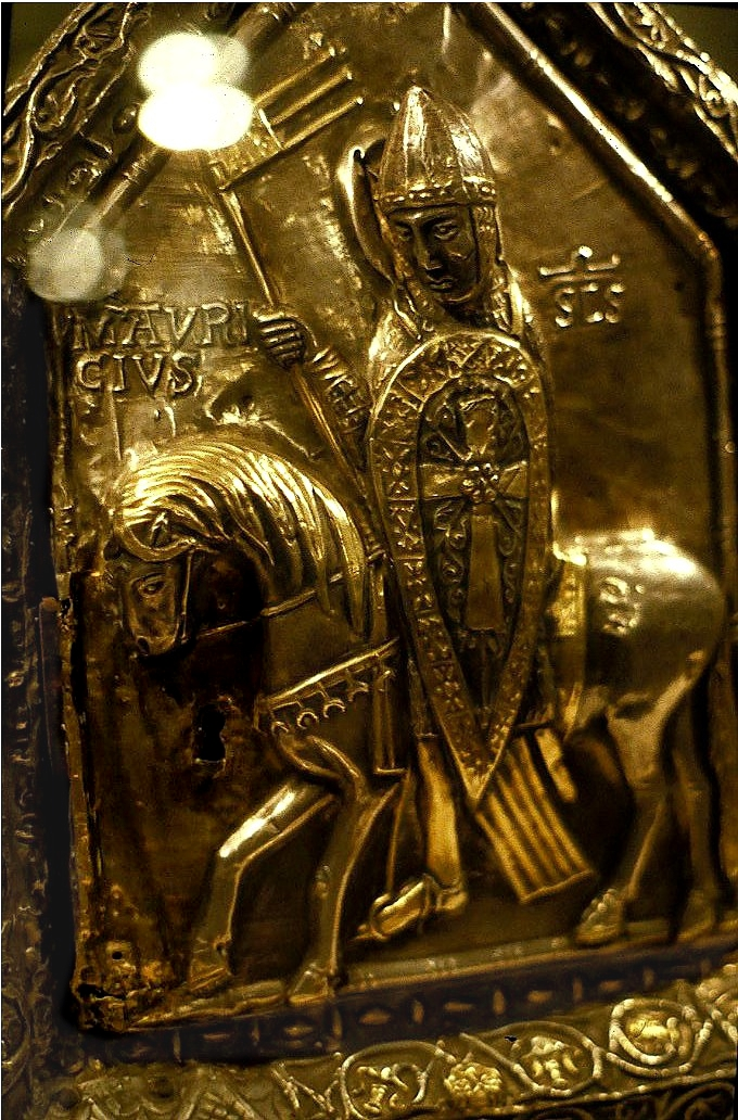 Bildbeschreibung: Saint-Maurice - Detail des Sigismund-Schreins in Saint-Maurice. (Die ursprüngliche Beschreibung war falsch. In dem Relief ist zwar Mauritius dargestellt, aber es ist der Sigismund-Schrein.) Quelle: Spurzem Fotograf: Lothar Spurzem Datum: 1990